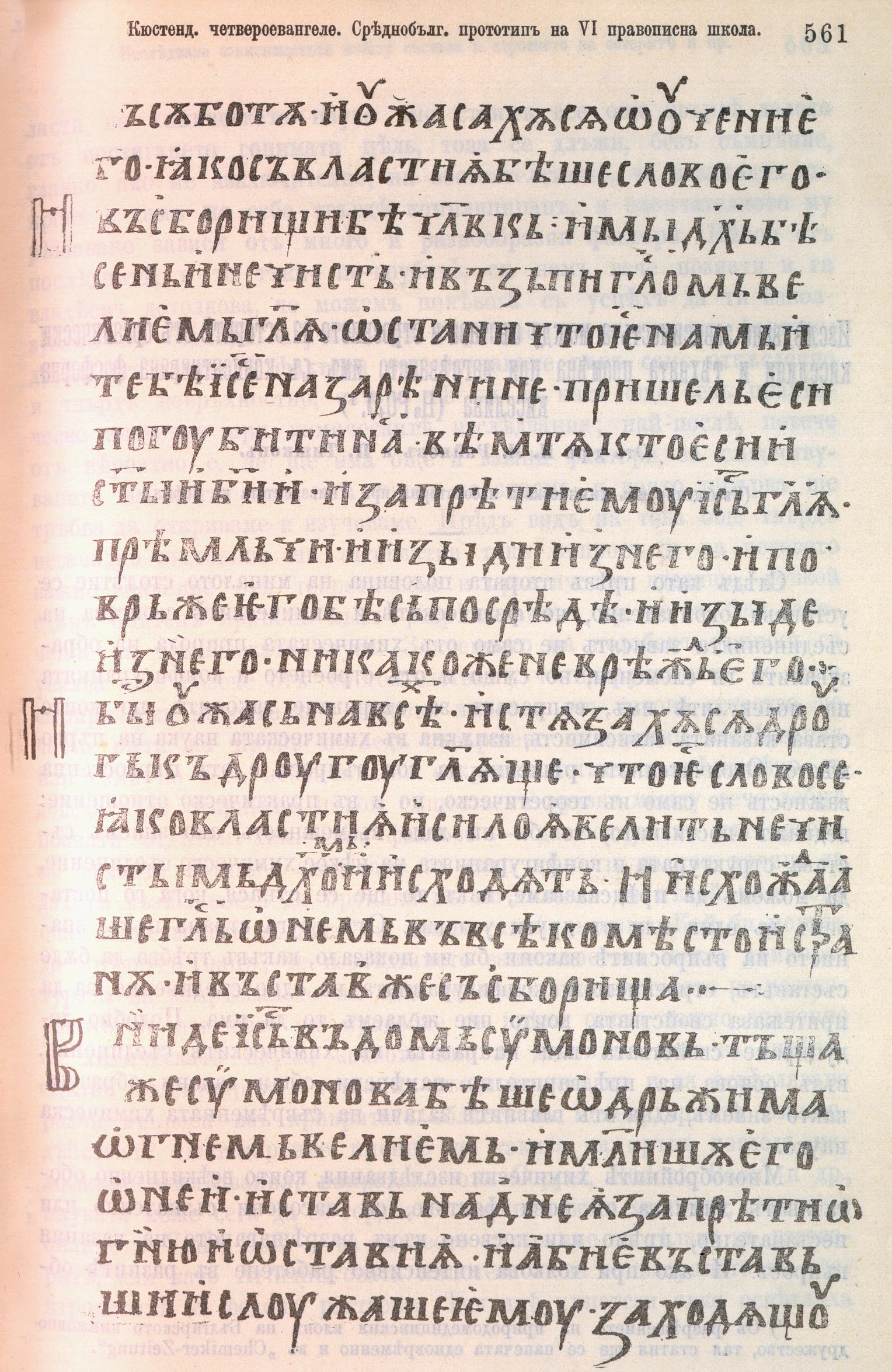 Кюстендилско четвероевангелие : Среднобългарски прототип на VI правописна школа.